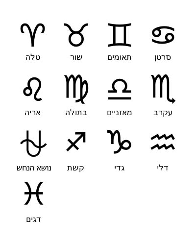 מזלות שונים